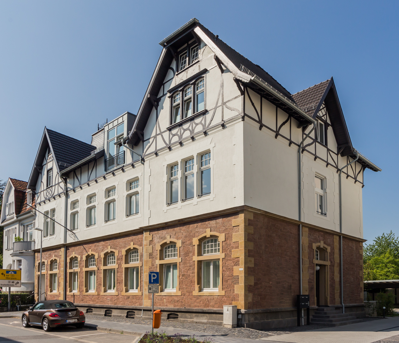 Denkmalgeschütztes Gebäude (erbaut 1902), ehemaliges Postamt, Hauptstraße 310, Königswinter-Altstadt – nach Renovierung 2013/14